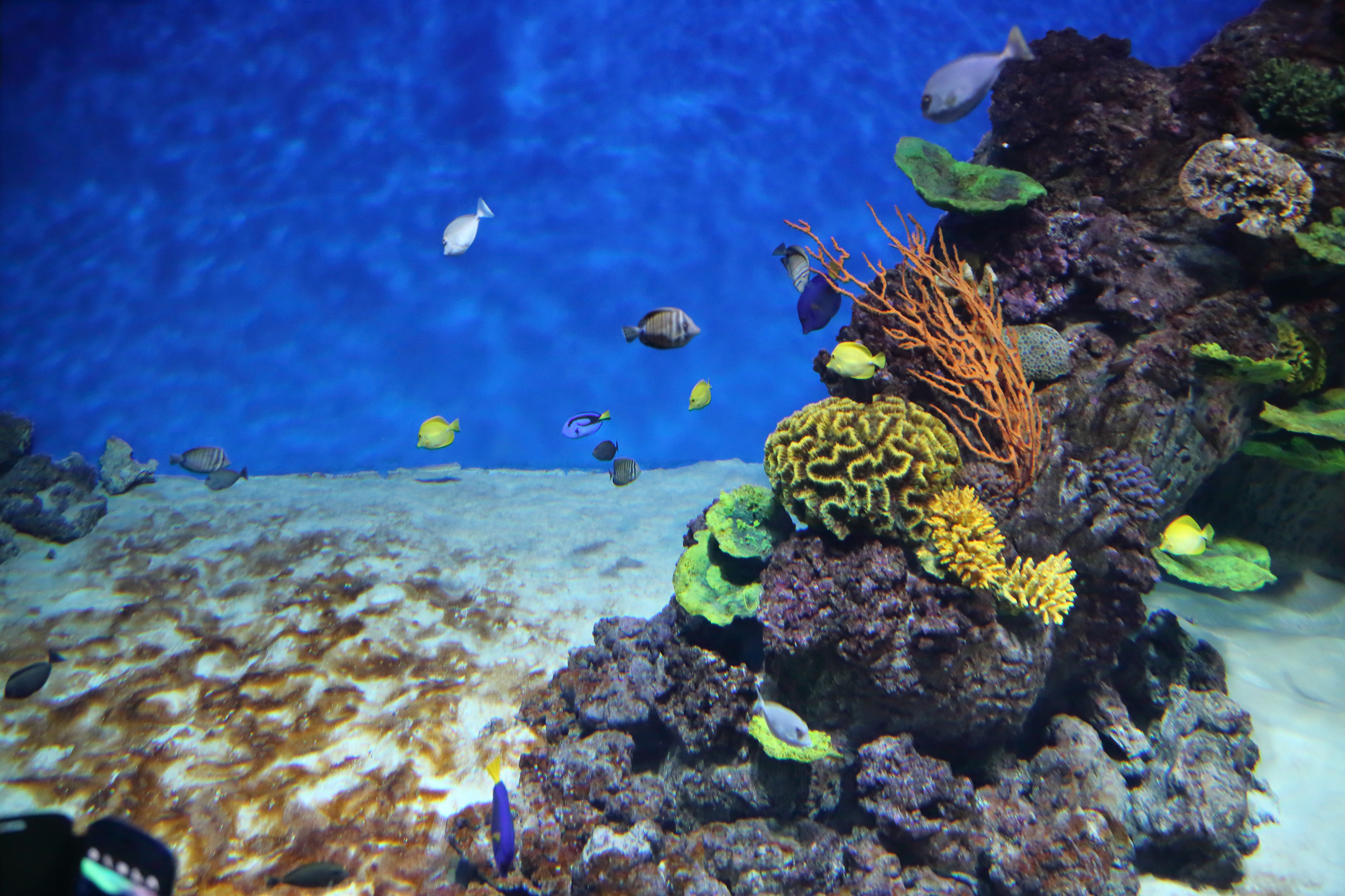 Аквариум в павильоне "Москвариум", ВВЦ, Москва